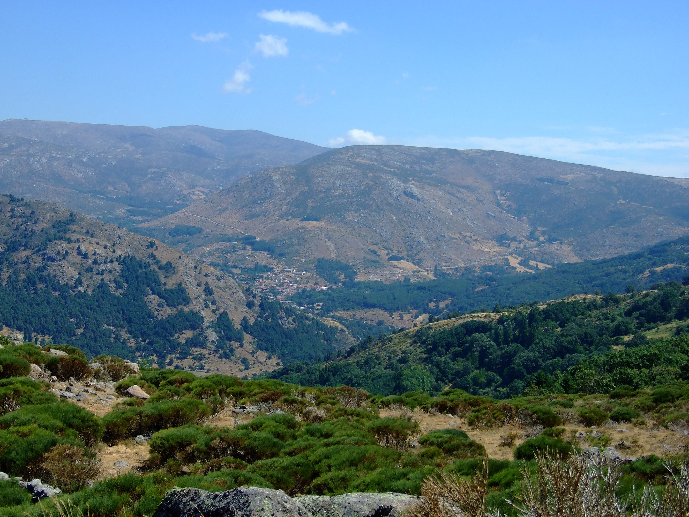 VISTA DE NAVACEPEDILLA DE CORNEJA (ÁVILA; ESPAÑA) tomada desde la Sierra de Villafranca, detrás La Serrota